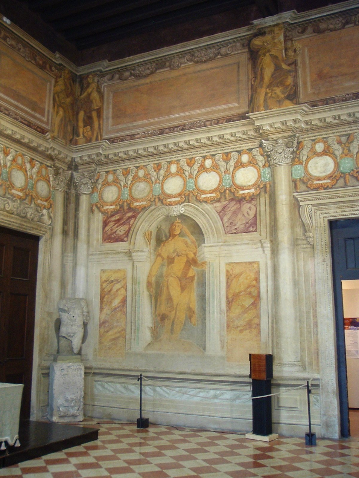 Teatro Olympico, Vicenza